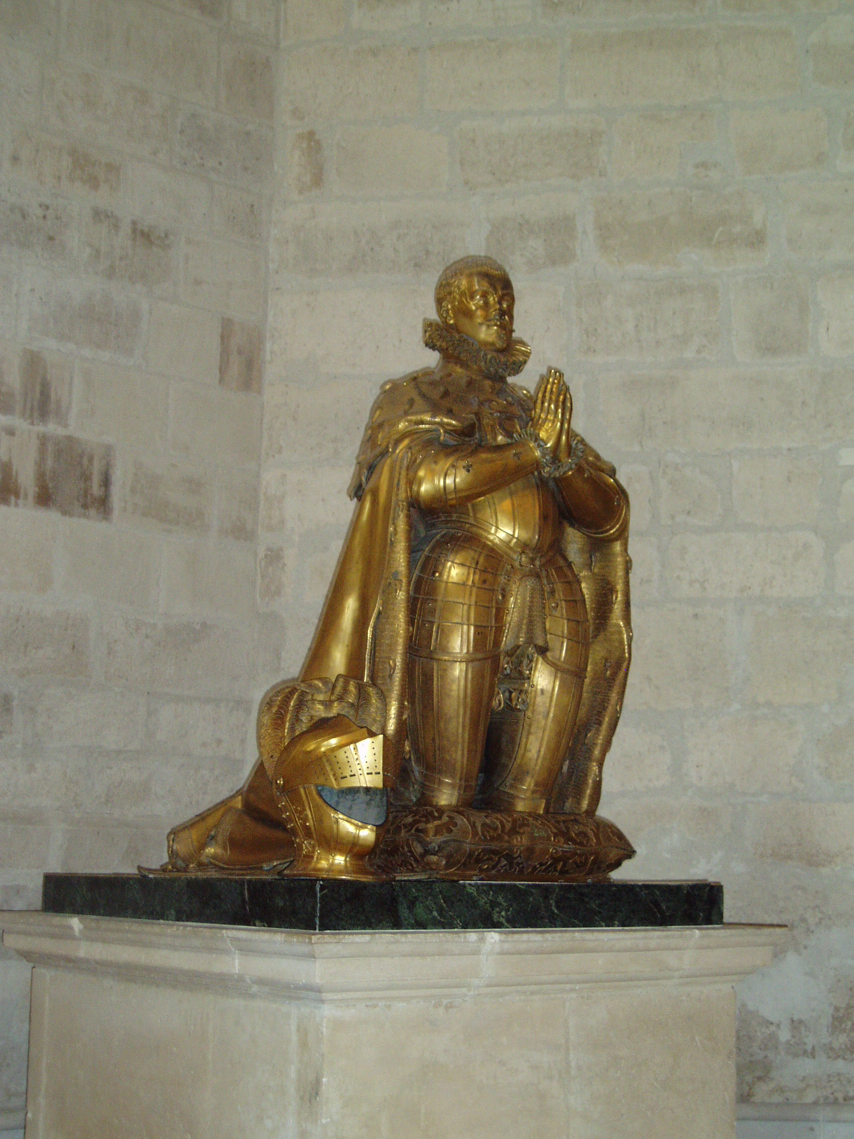 Estatua del Duque de Lerma en el interior de la Capilla del Colegio de San Gregorio, Valladolid. Procede de la capilla mayor de la Iglesia de San Pablo de Valladolid. Francisco de Sandoval y Rojas contrata (1601) a Pompeo Leoni los monumentos funerarios de los Duques de Lerma en bronce dorado. Moldean en yeso Millán Vimercado y Baltasar Mariano. Juan de Arfe y Villafañe funde en bronce fino, sustituido a su muerte por Lesmes Fernández del Moral, que lo termina en 1607.